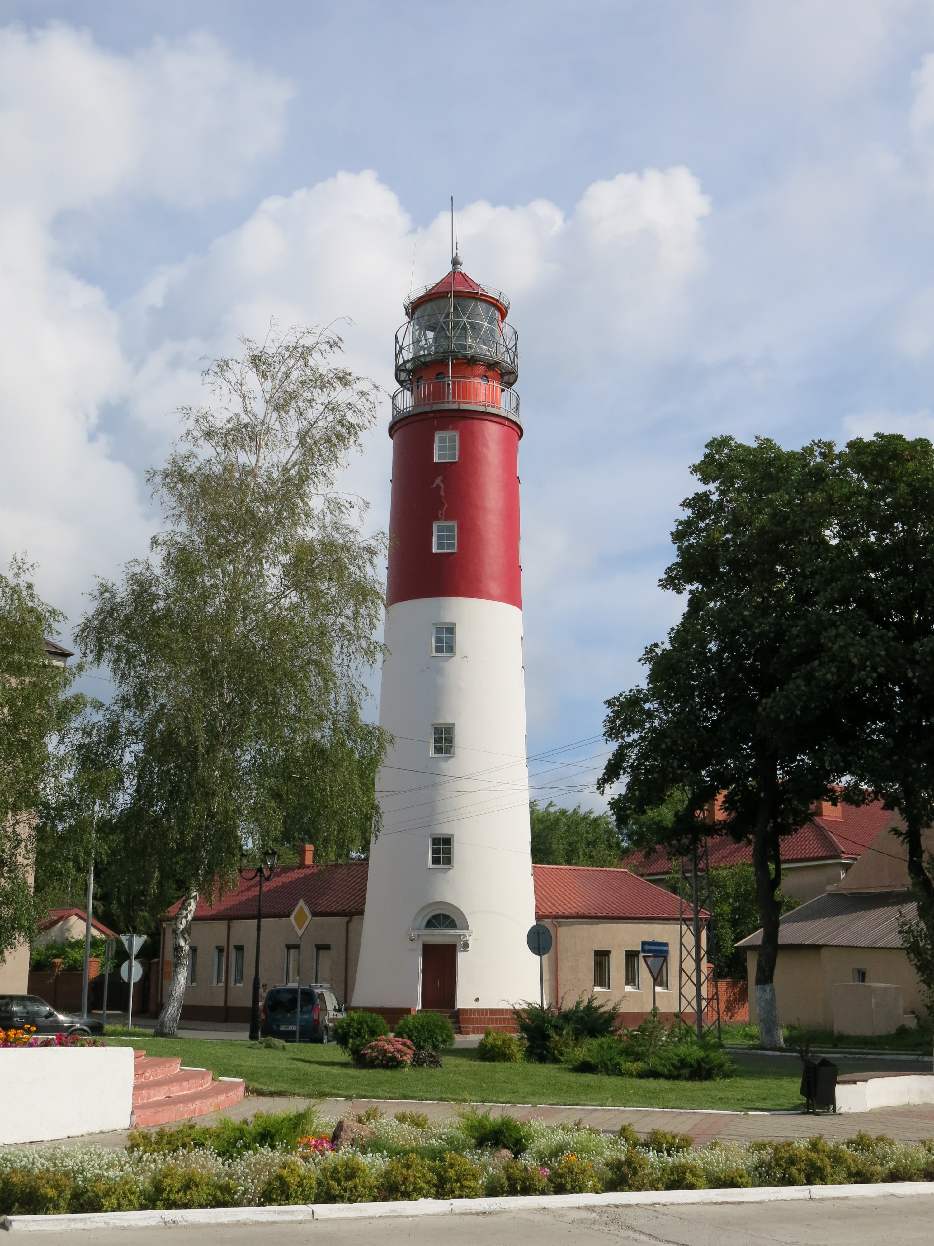 Маяк: бульвар Морской, Балтийск, Калининградская область